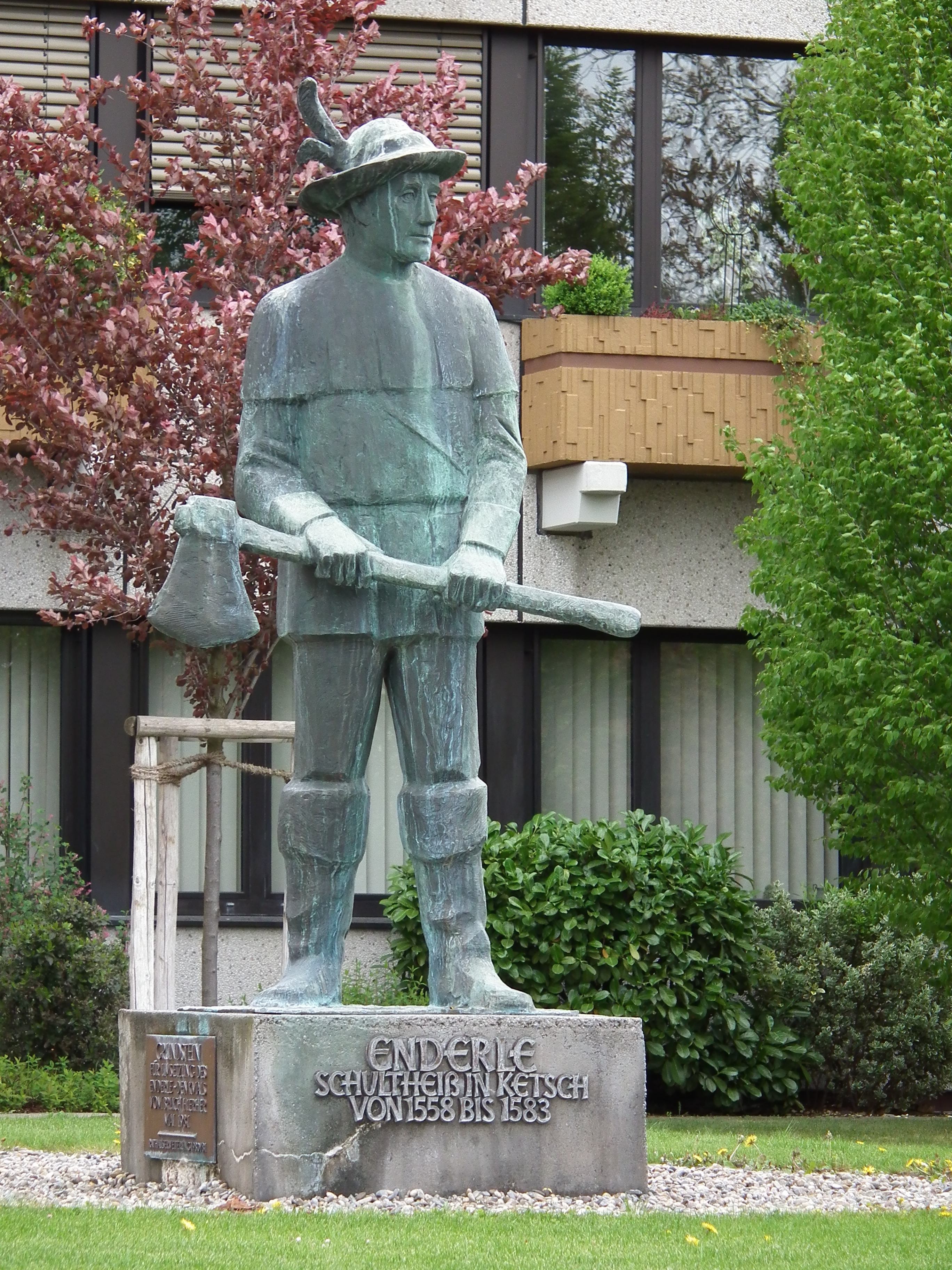 Skulptur des Enderle, Schultheiß von 1558 bis 1583, aufgestellt vor dem Rathaus in Ketsch (Baden-Württemberg, Deutschland)